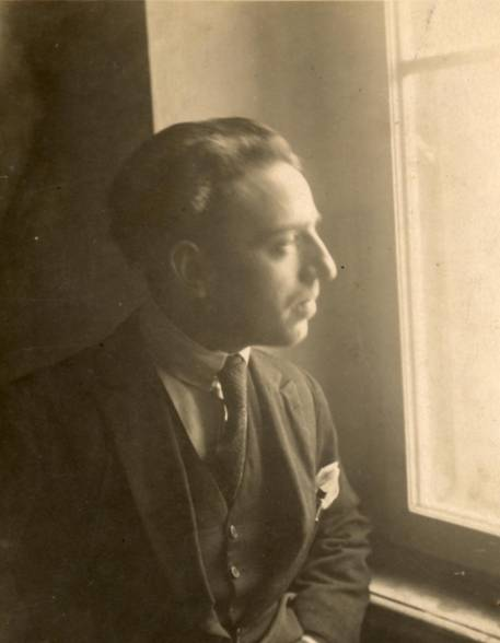 Archivio Progetti, Università iuav di Venezia